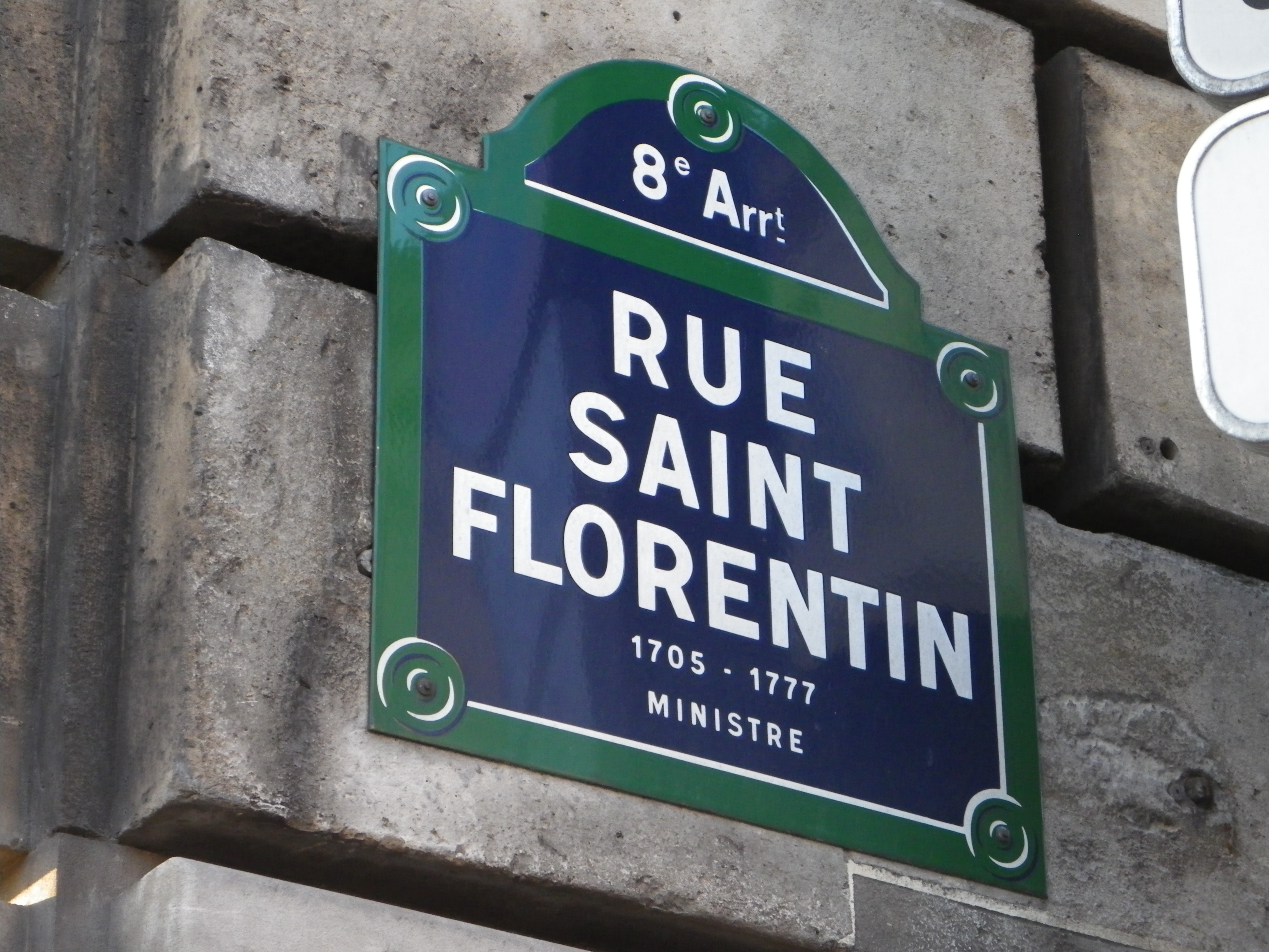 Plaque rue Saint Florentin à Paris